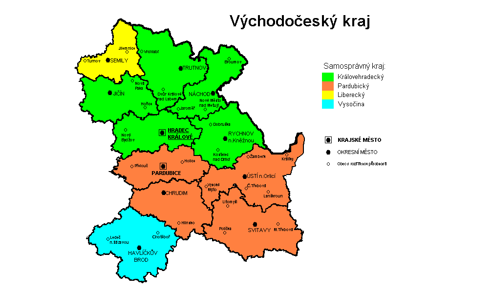 Mapa Východočeského kraje (1960-1990)